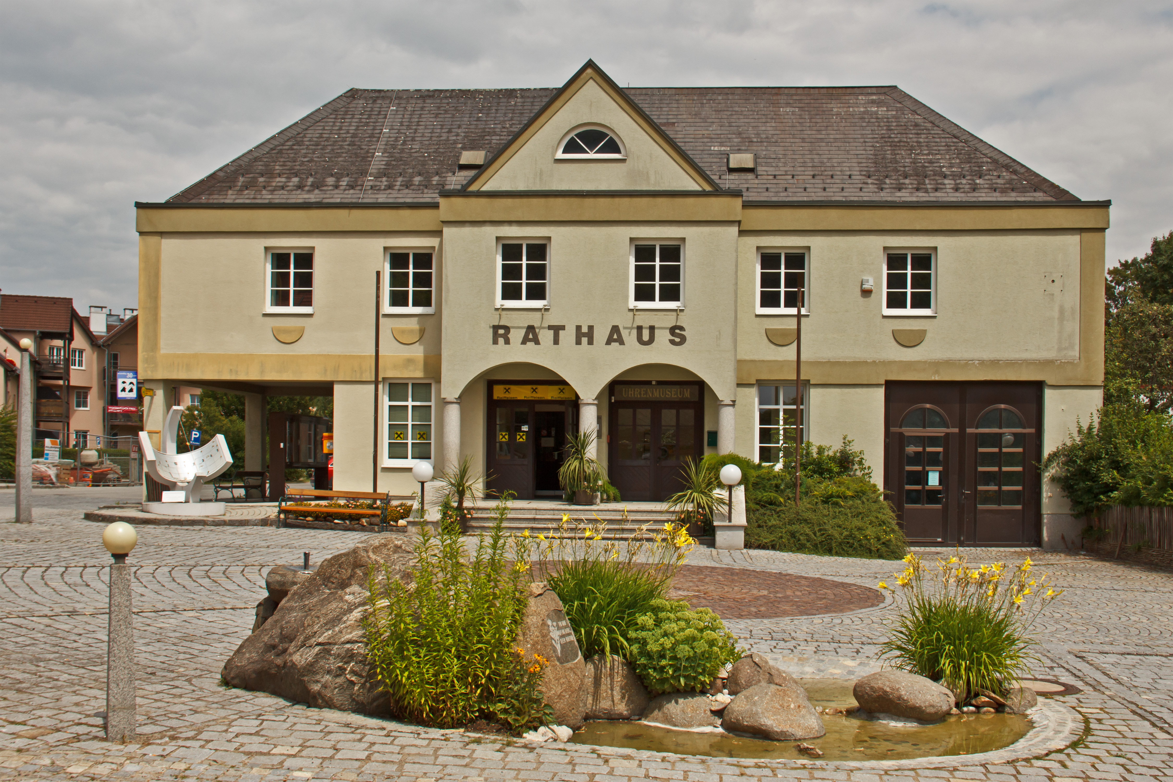 Gemeindeamt - Uhrenmuseum Karstein an der Thaya